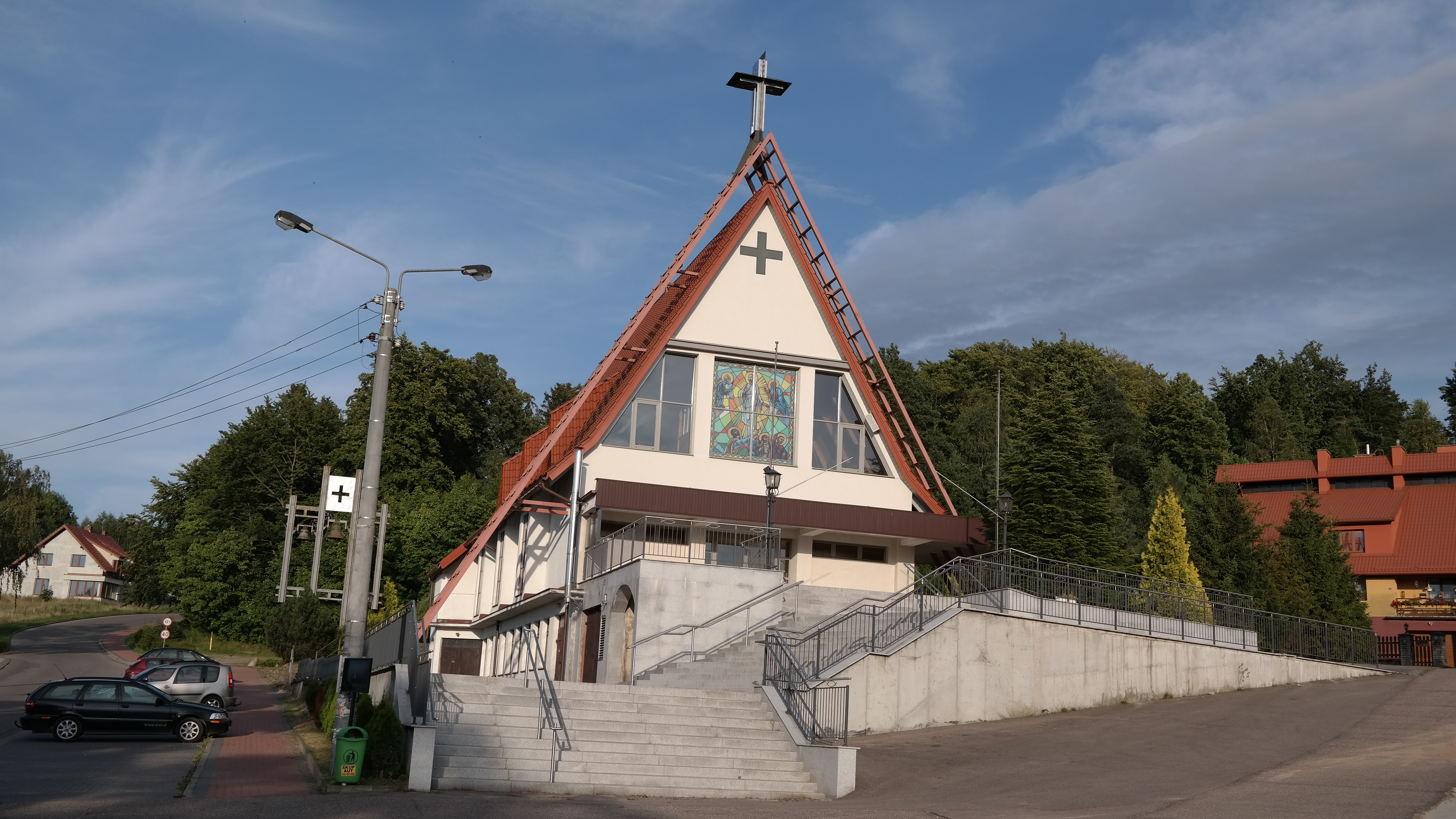 Kościół w Somoninie wraz z plebanią po prawej stronie.